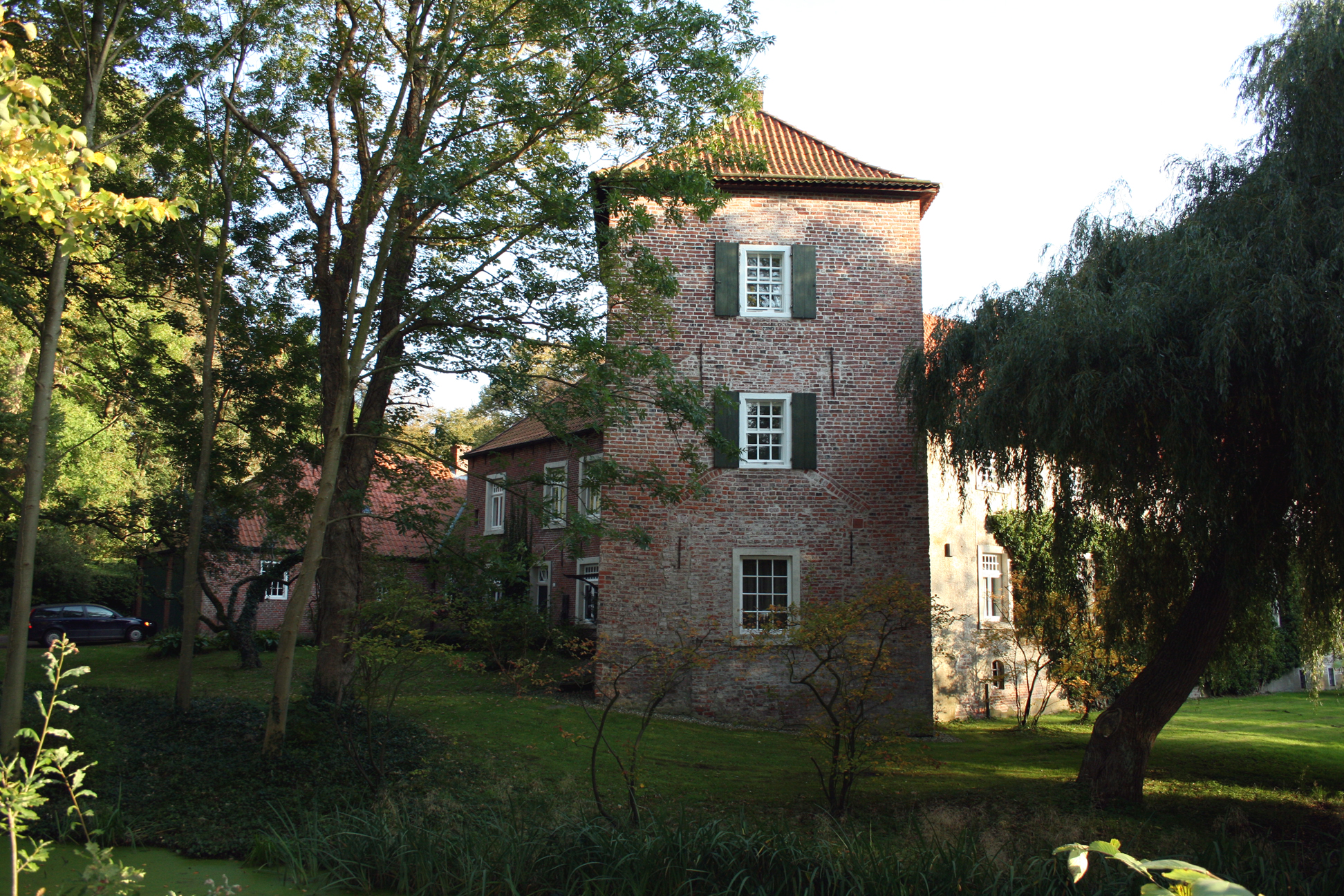 Turm von Burg Berum von der Straßenseite fotografiert